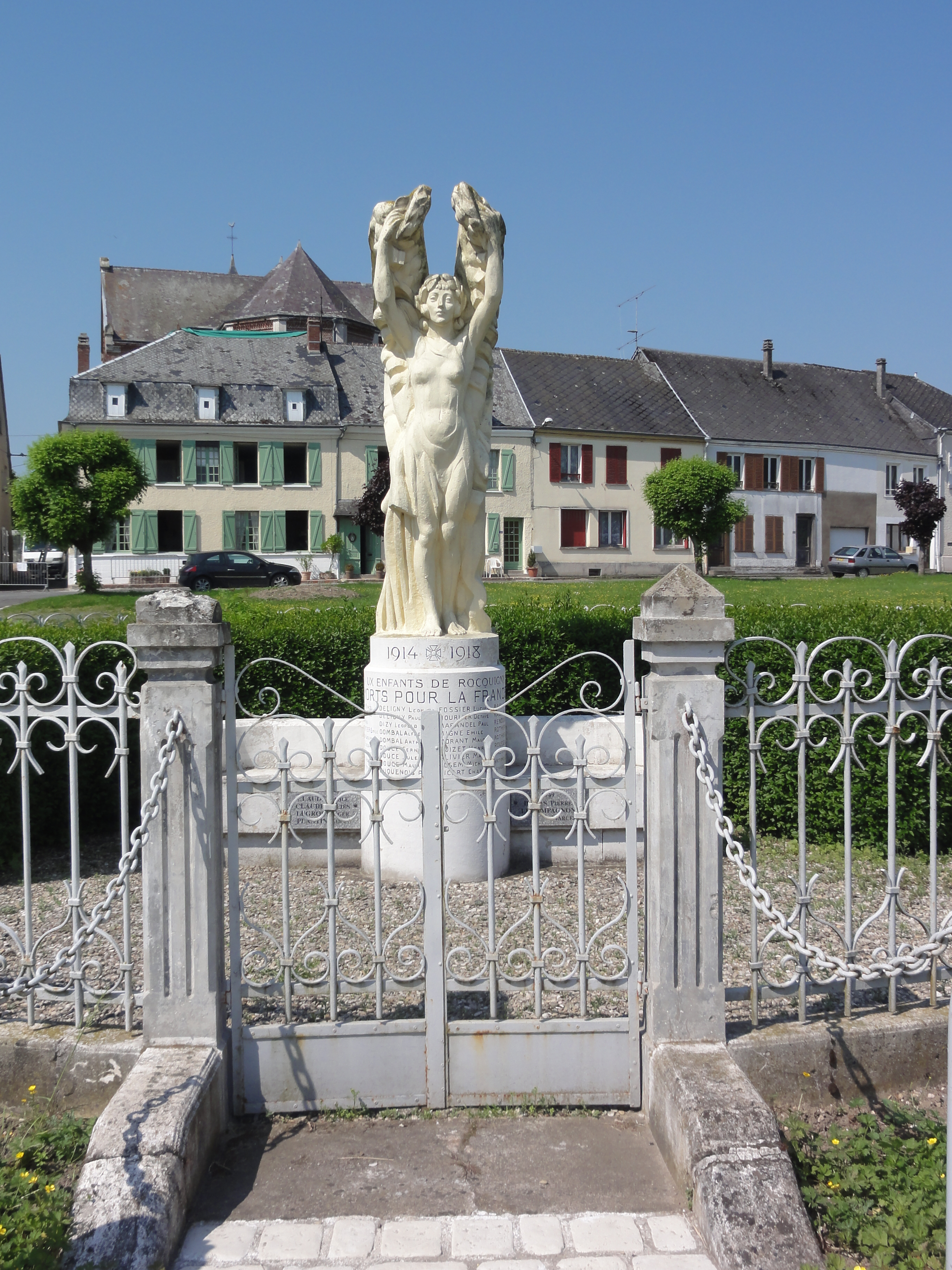 Rocquigny (Ardennes) Monument aux morts